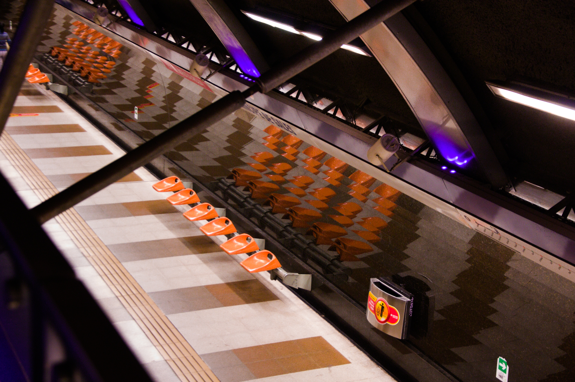 Príncipe de Gales metro station, Santiago, Chile.